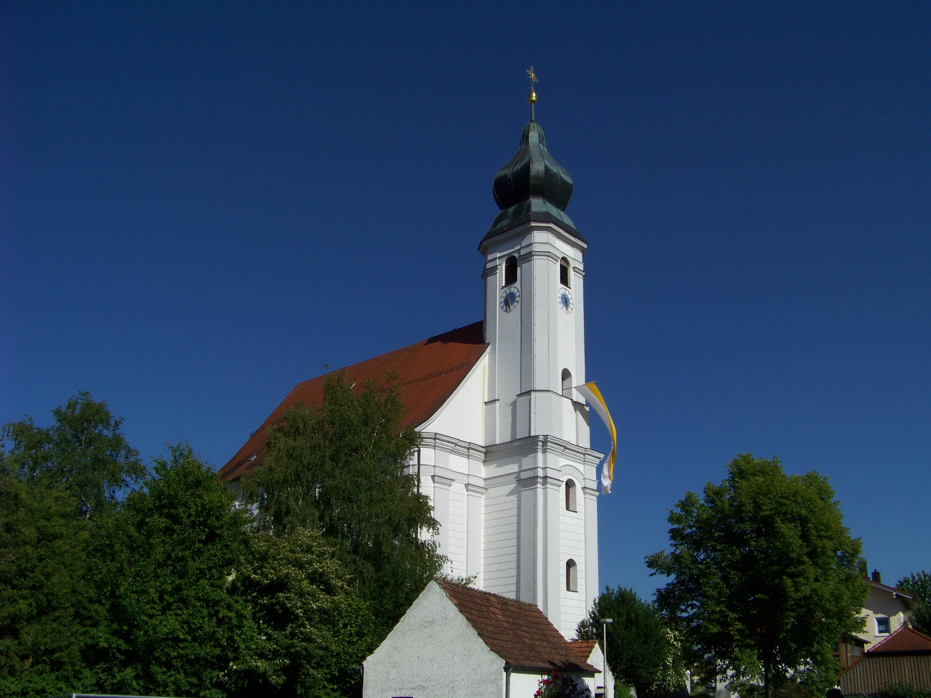 Deggendorf, Rettenbach, Kirchenstraße 4. Katholische Filialkirche Mariä Heimsuchung. barocker, ausgerundeter Saalraum mit querovalem Chor und Westturm, von Georg Felix Hirschstötter d. J., 1754–58; mit Ausstattung; Friedhofsmauer, wohl 18. Jahrhundert.